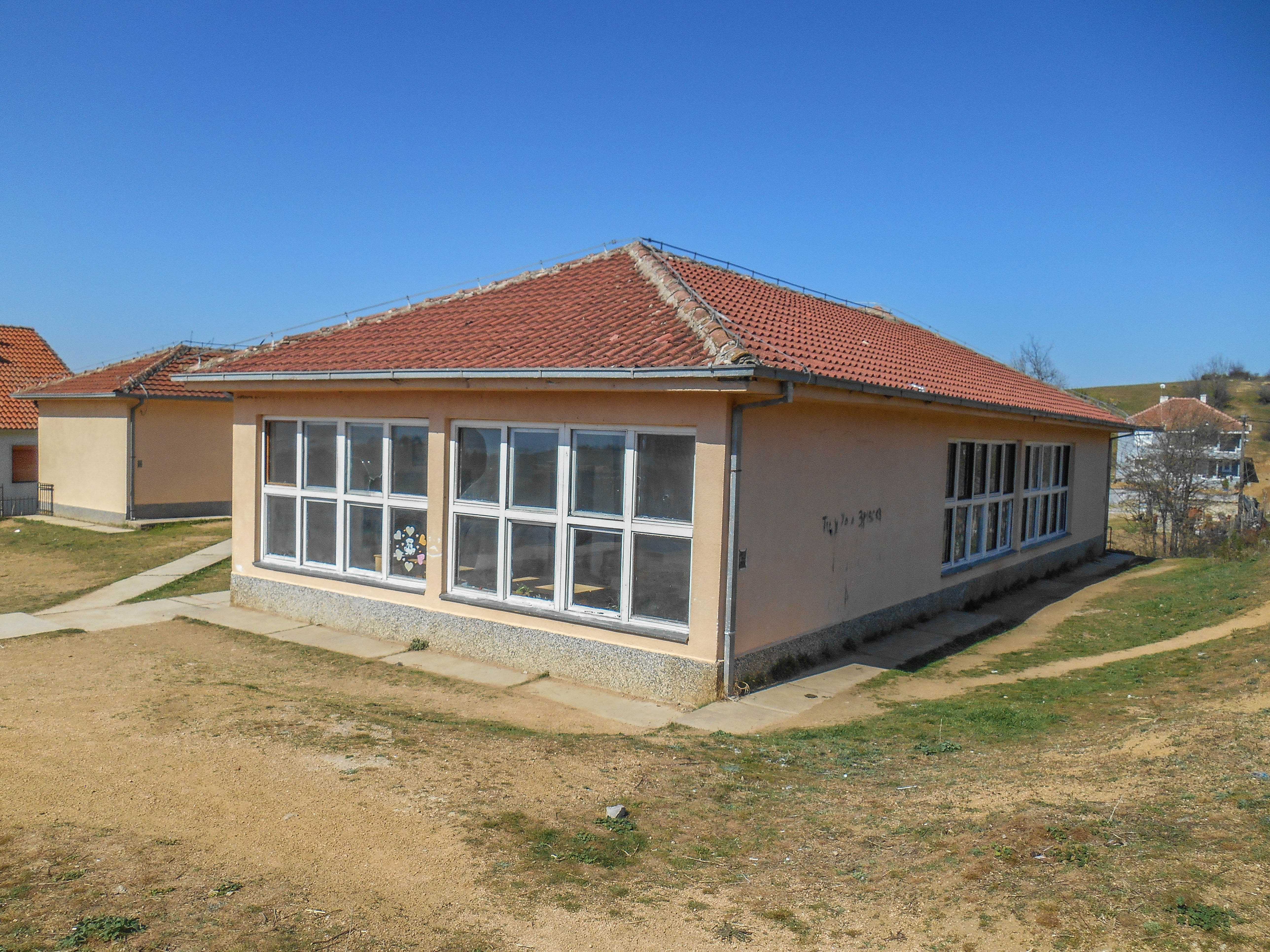 Основно училиште „Гоце Делчев“ - Дрвош